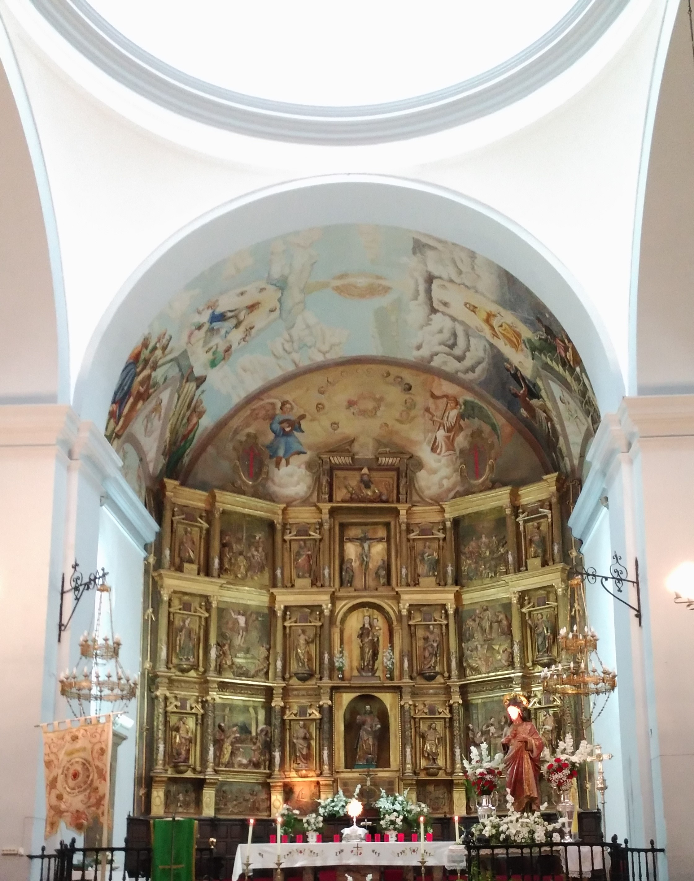 Altar mayor con retablo renacentista de Santa Maria del Valle de Villafranca de los Barros